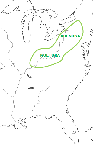 Območje Adenske kulture